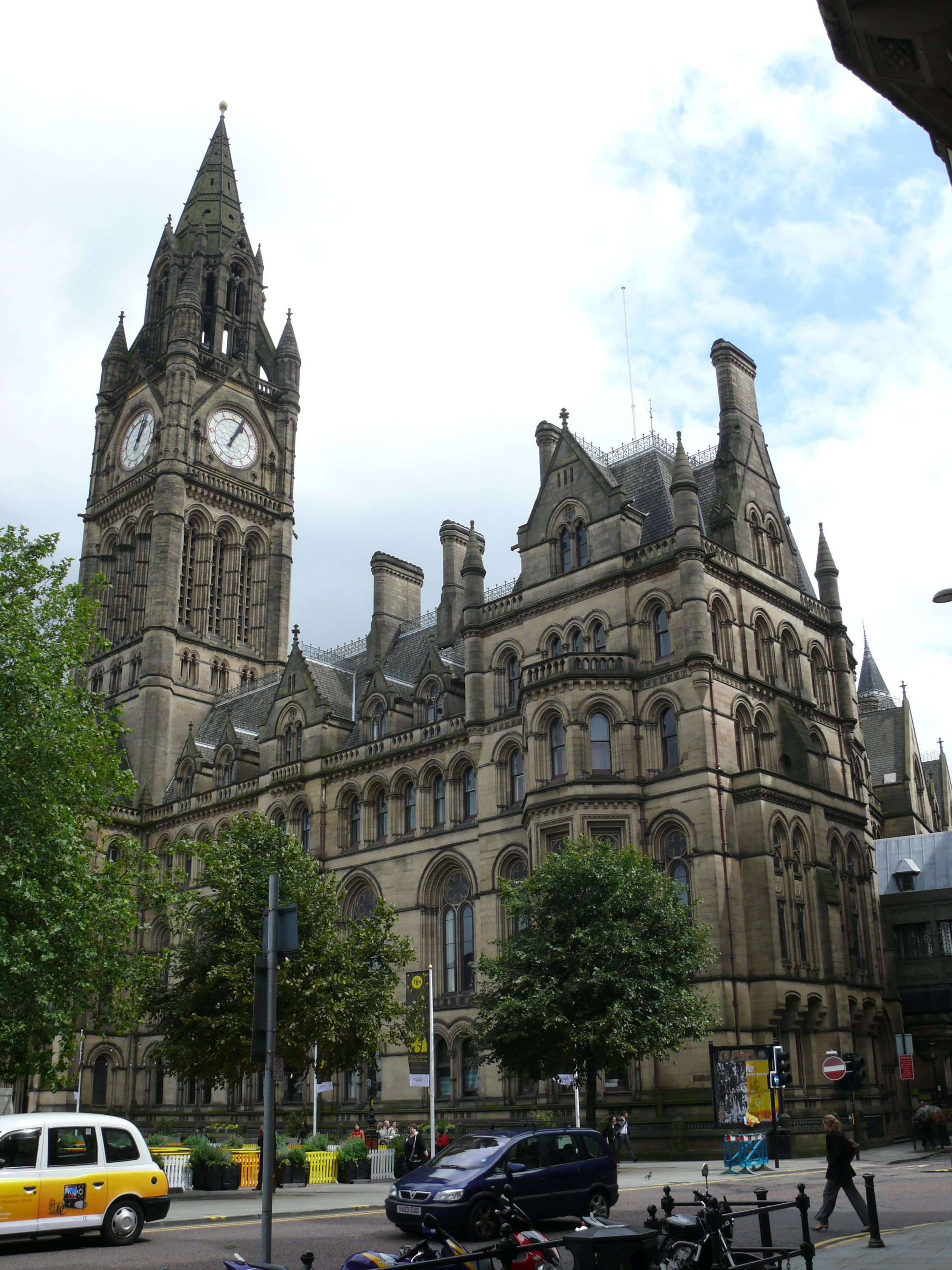 Manchester centre